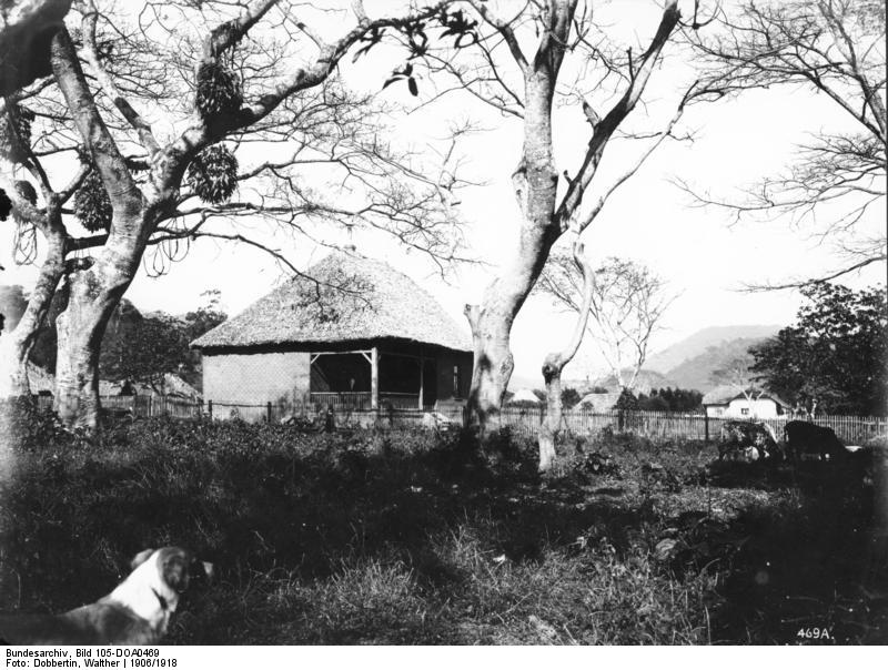 Aruscha, Missionsstation